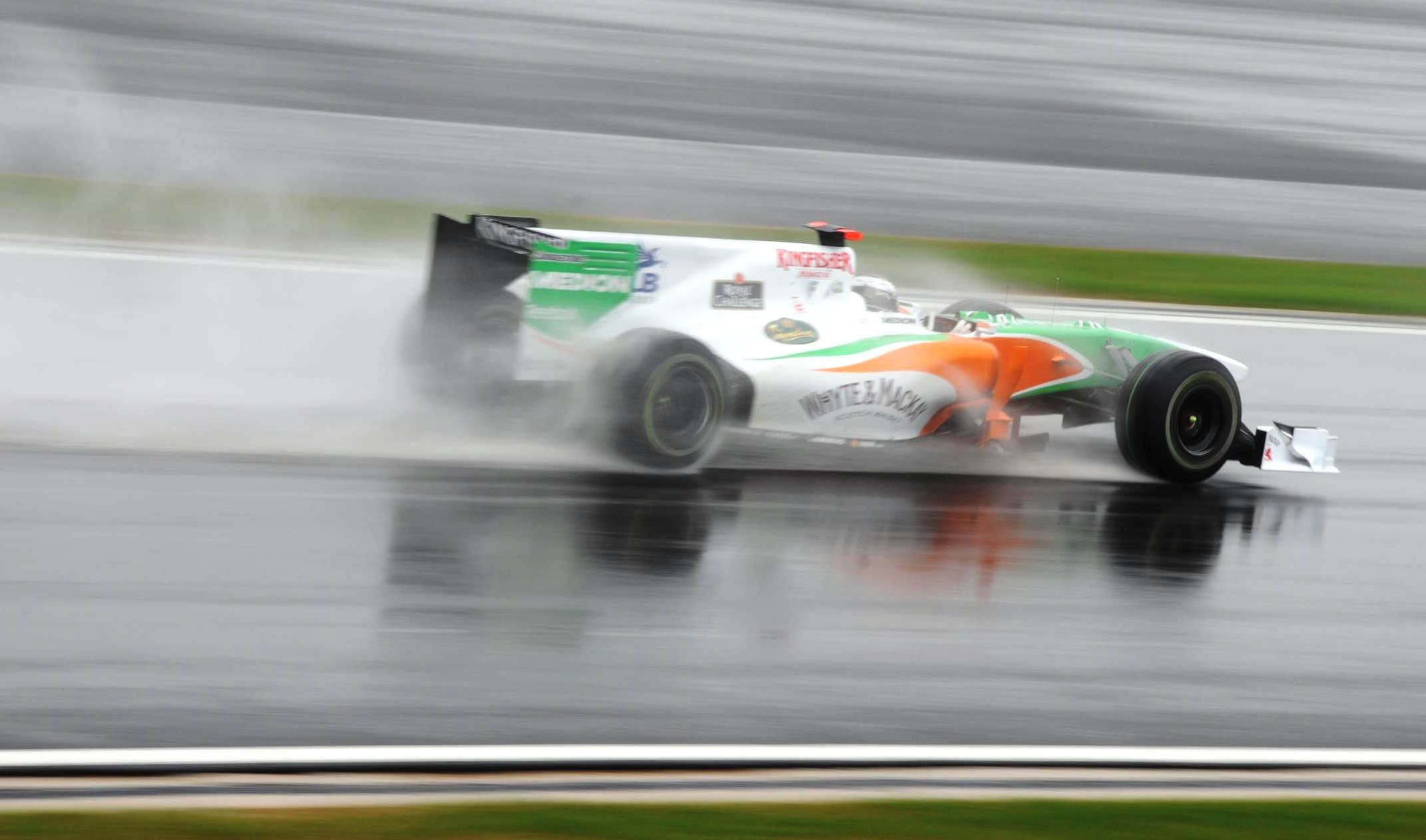 Force India GP de Corée 2010